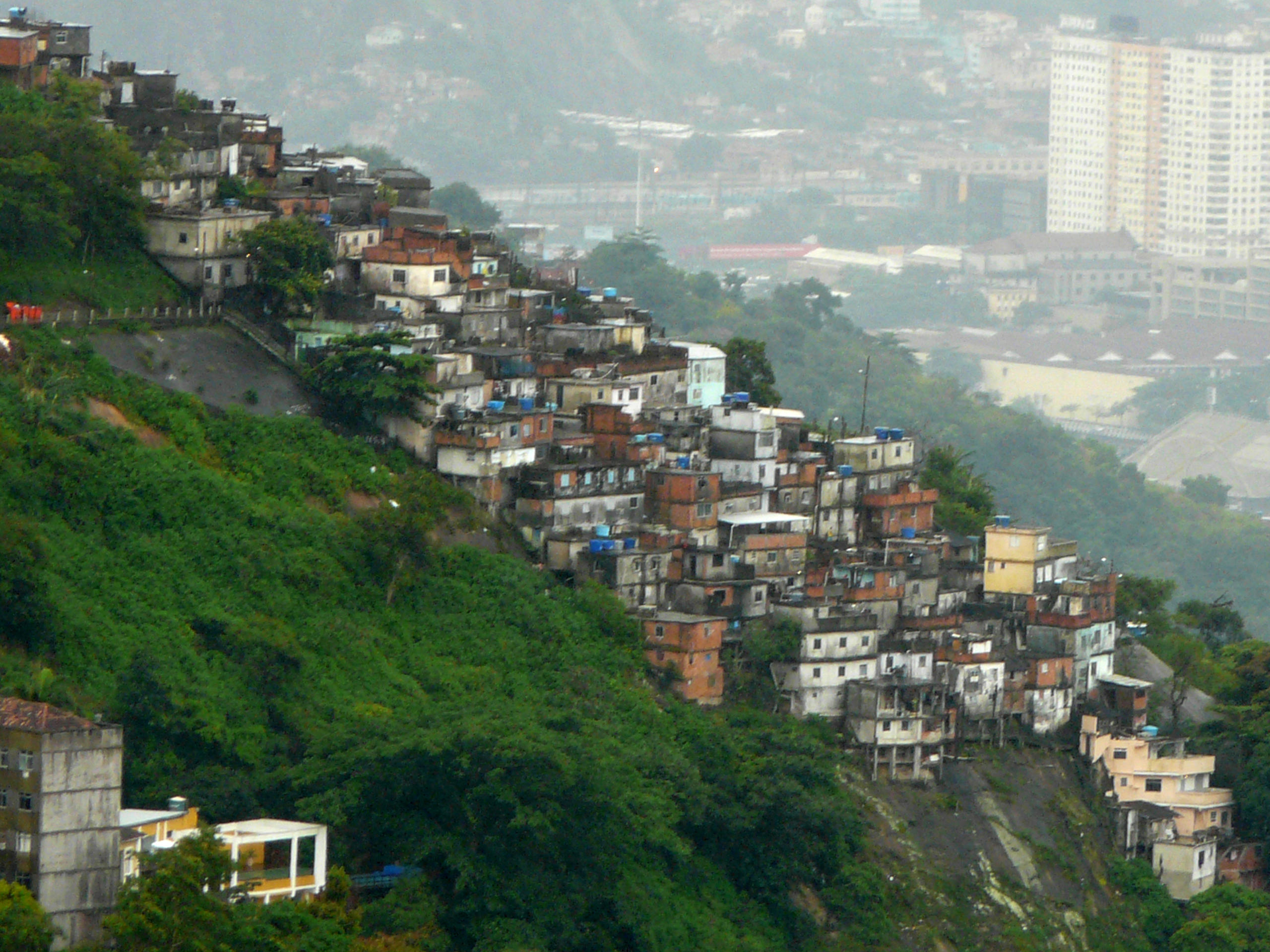 Favela